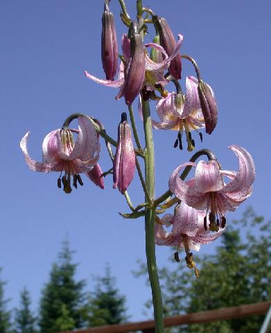 Lilium keloggii